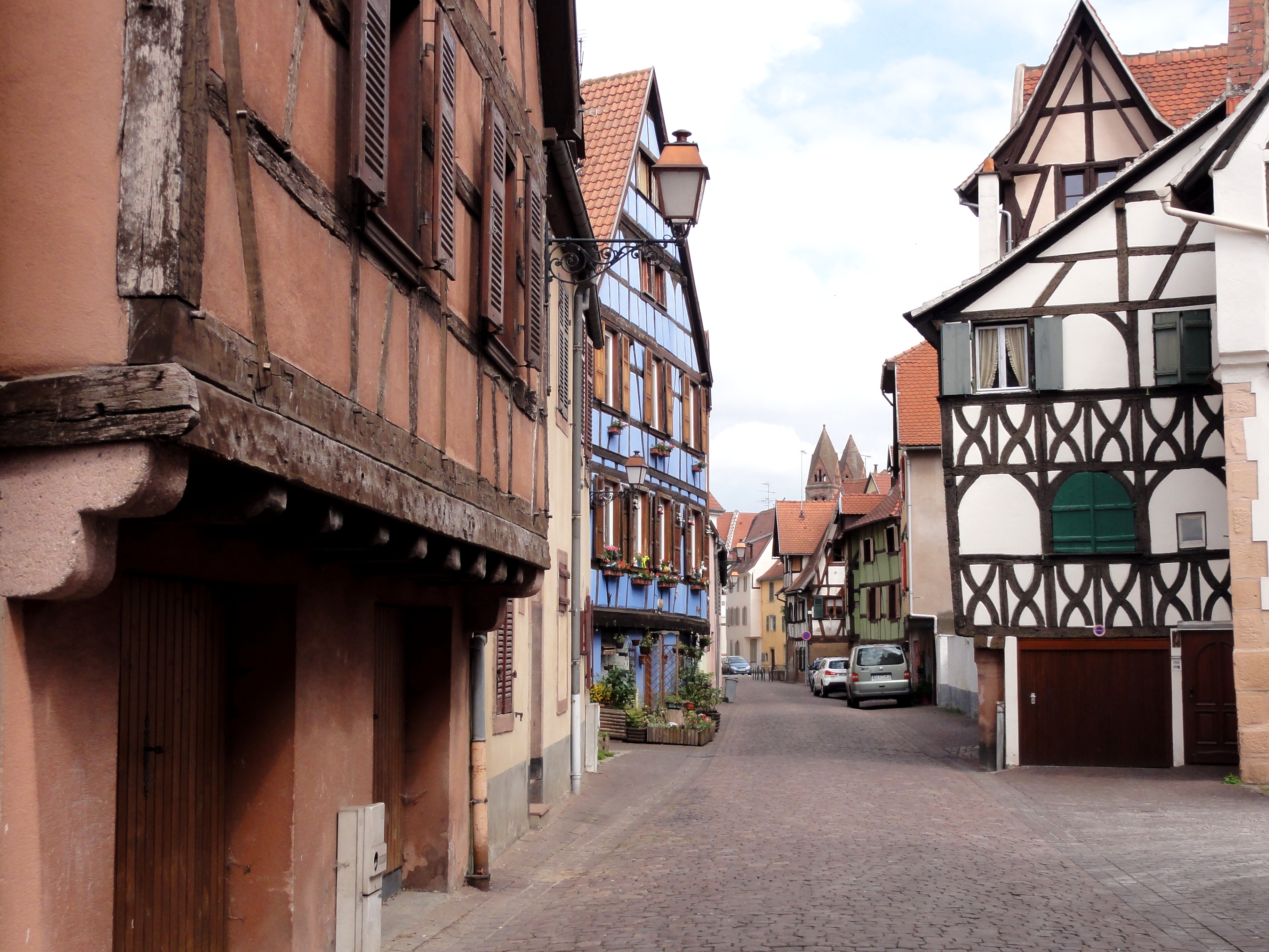 Alsace, Bas-Rhin, Sélestat, Quai des Tanneurs.